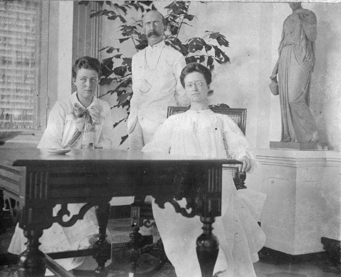 Foto. Oom Melchior Treub, Netty en Louise Treub in een hoek van de voorgalerij in 's Lands Plantentuin, Buitenzorg.